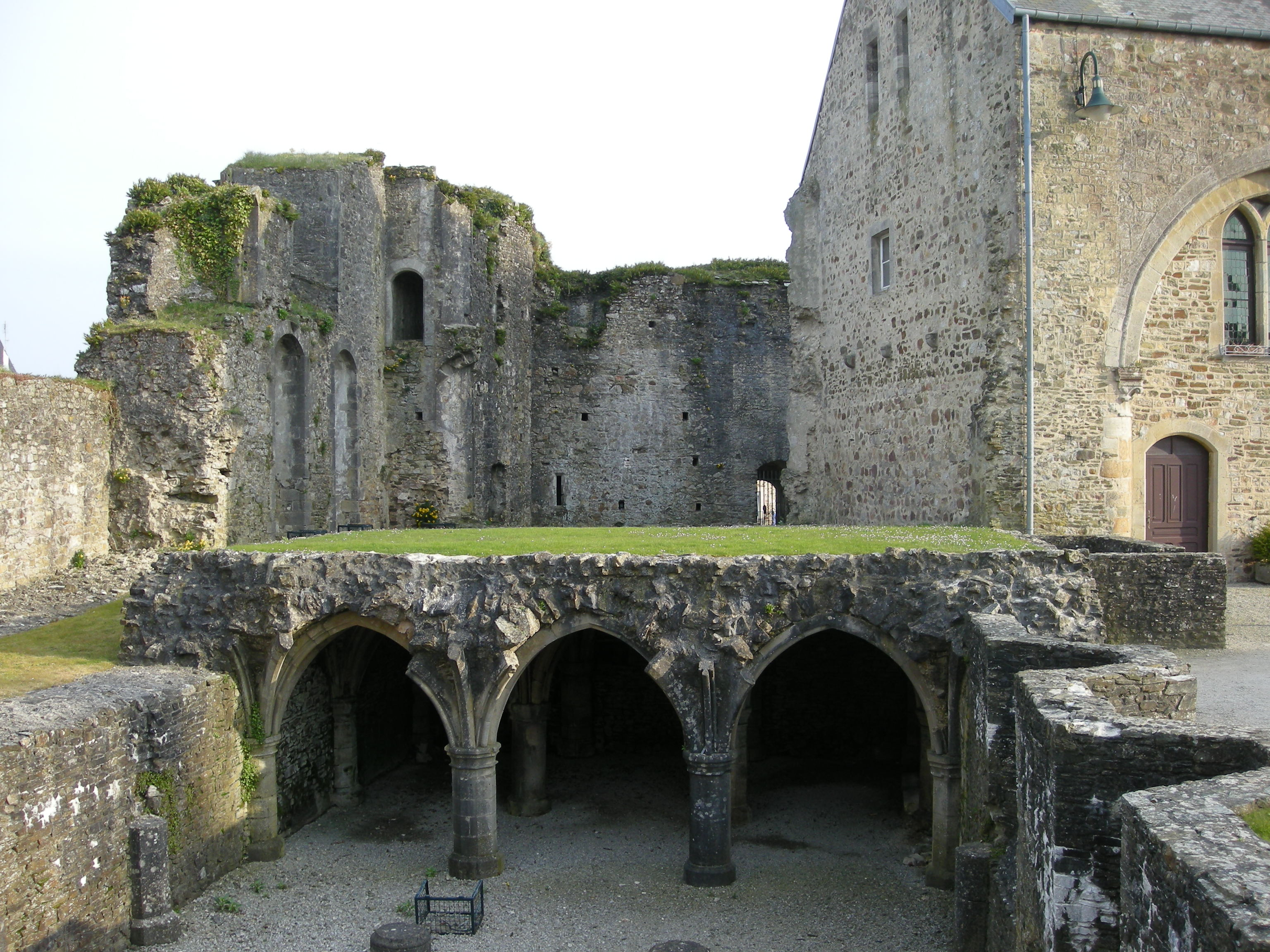 Vestiges du Vieux Château de Bricquebec (Manche, Normandie, France)